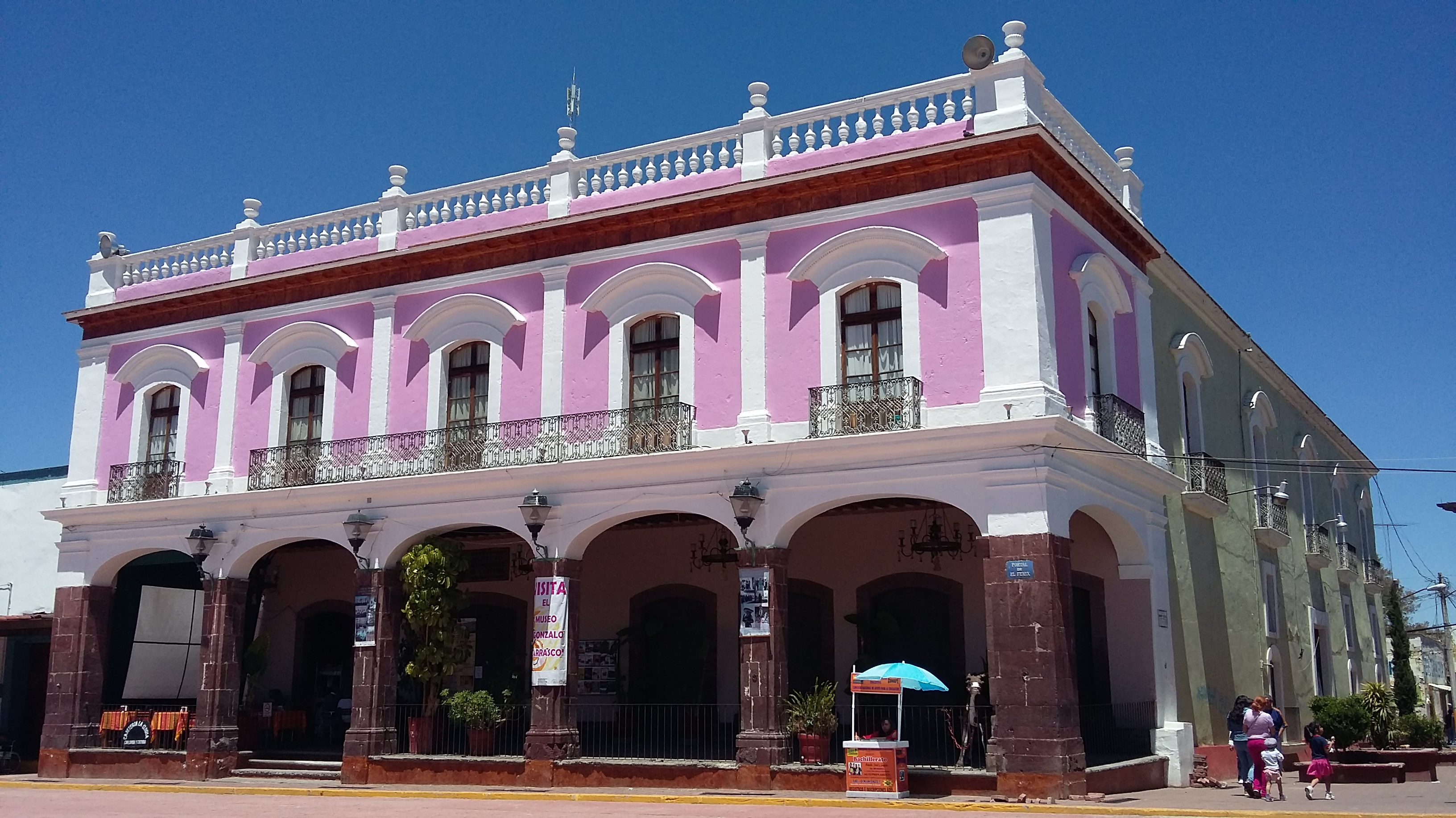 Edificio del Museo Gonzalo Carrasco y Casa de Cultura. Otumba, Estado de Mexico.